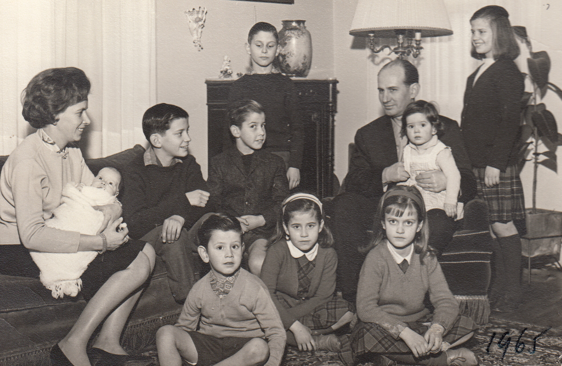 Eugenio Cruz Vargas junto a su esposa, Luz Vergara Errázuriz, y sus nueve hijos. Autor de la fotografía: Hugo Infante Troncoso (1922), profesional chileno de la fotografía, quien en calidad de autor y propietario titular de la misma otorgó el consentimiento para publicar y difundir en la red internet esta imagen bajo las condiciones que establece la Licencia de Uso Creative Commons, Atribución-Compartigual 3.0 Unported (CC BY-SA 3.0).